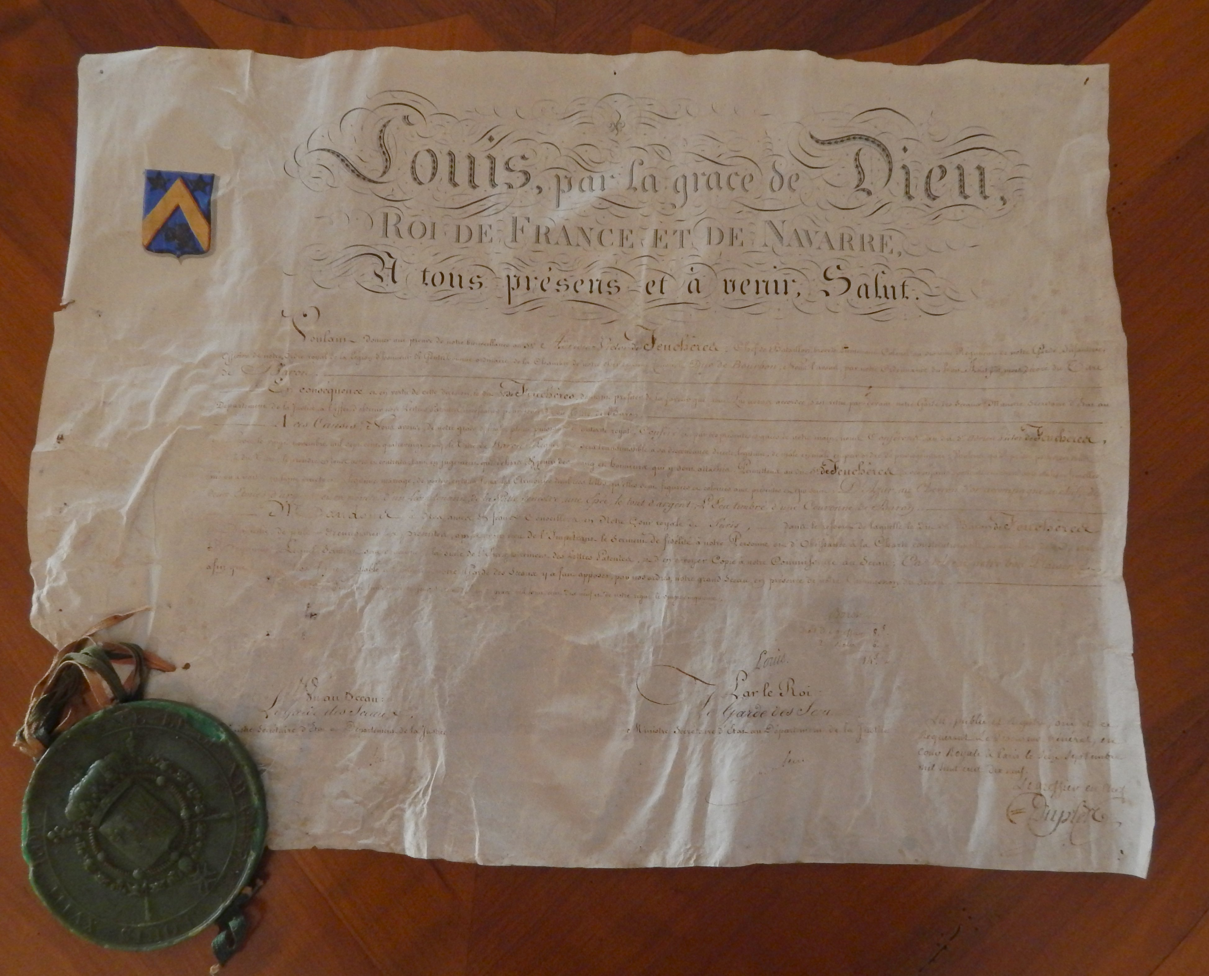 Lettre d'élévation au rang de Baron du chef de Bataillon de Feuchères avec attribution d'armoiries. Signée Louis XVIII et ornée du Grand Sceau du Roi.